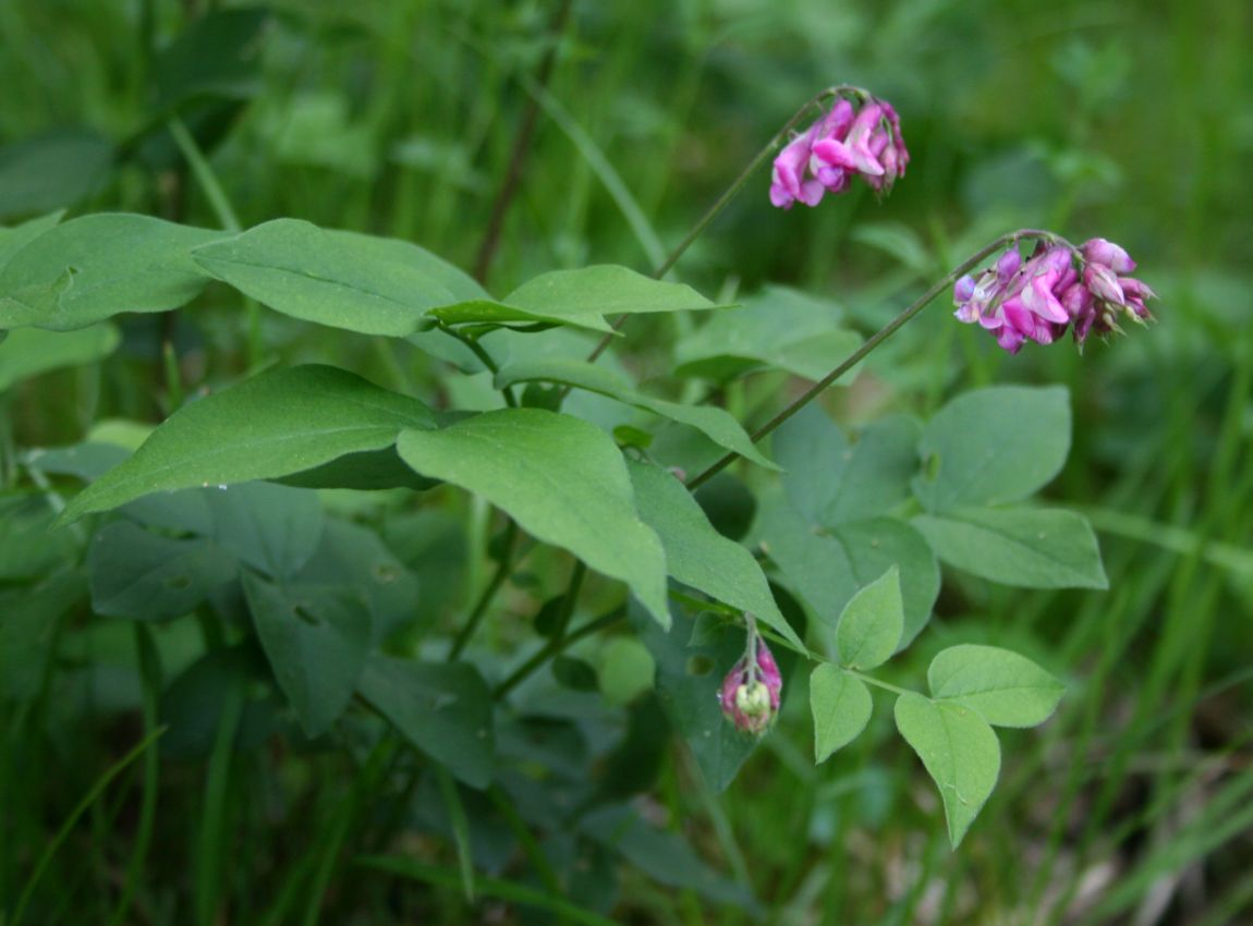 Bunt-Platterbse (Lathyrus venetus), Hülsenfrüchtler (Fabaceae) - Kroatien/Hrvatska/Croatia: Istra, Park Prirode Učka, Lovranska Draga